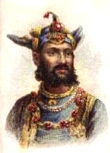 Jankoji Rao Scindia II, Maharaja of Gwalior